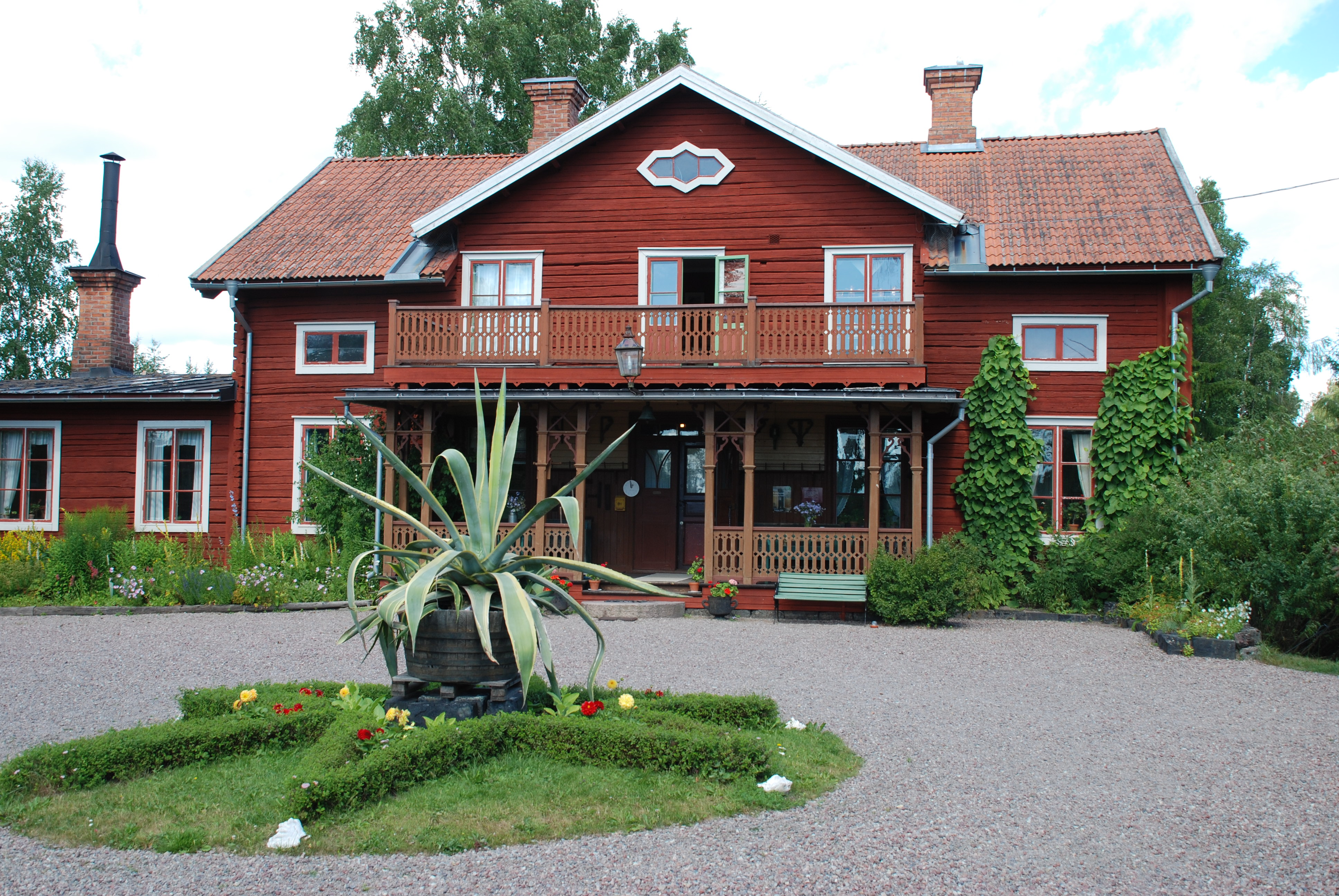 Bergsmansgården Stora Hyttnäs i Sundborn, Falu kommun.